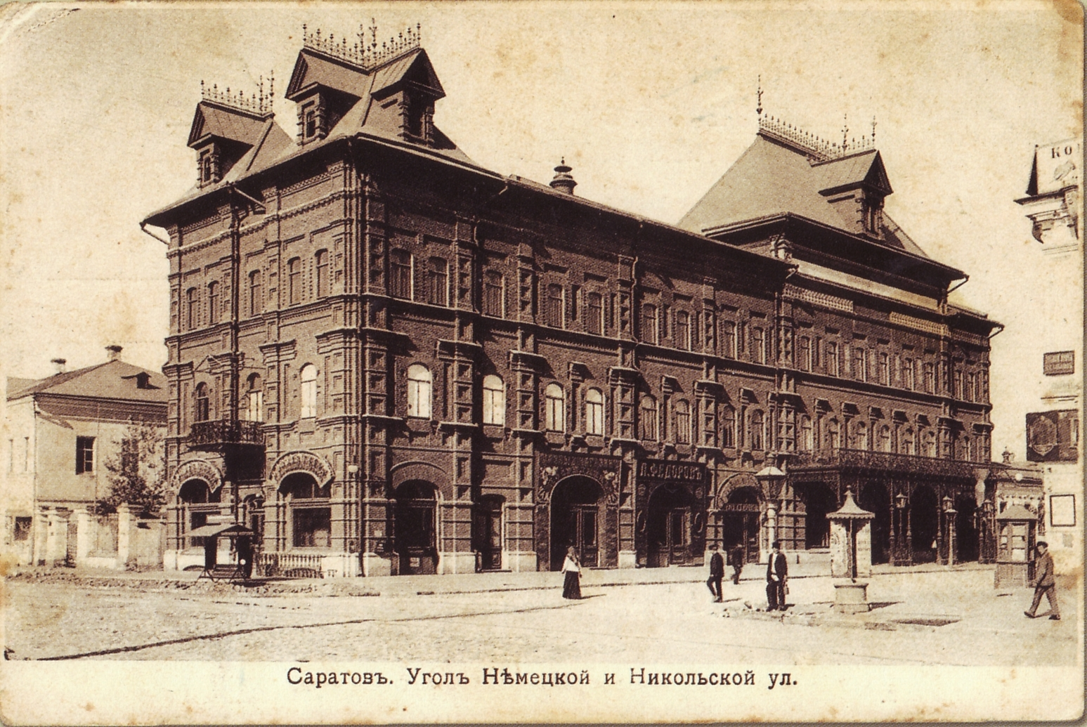 Музыкальное училище на уг. Никольской и Немецкой ул.(прим.1904 г.)